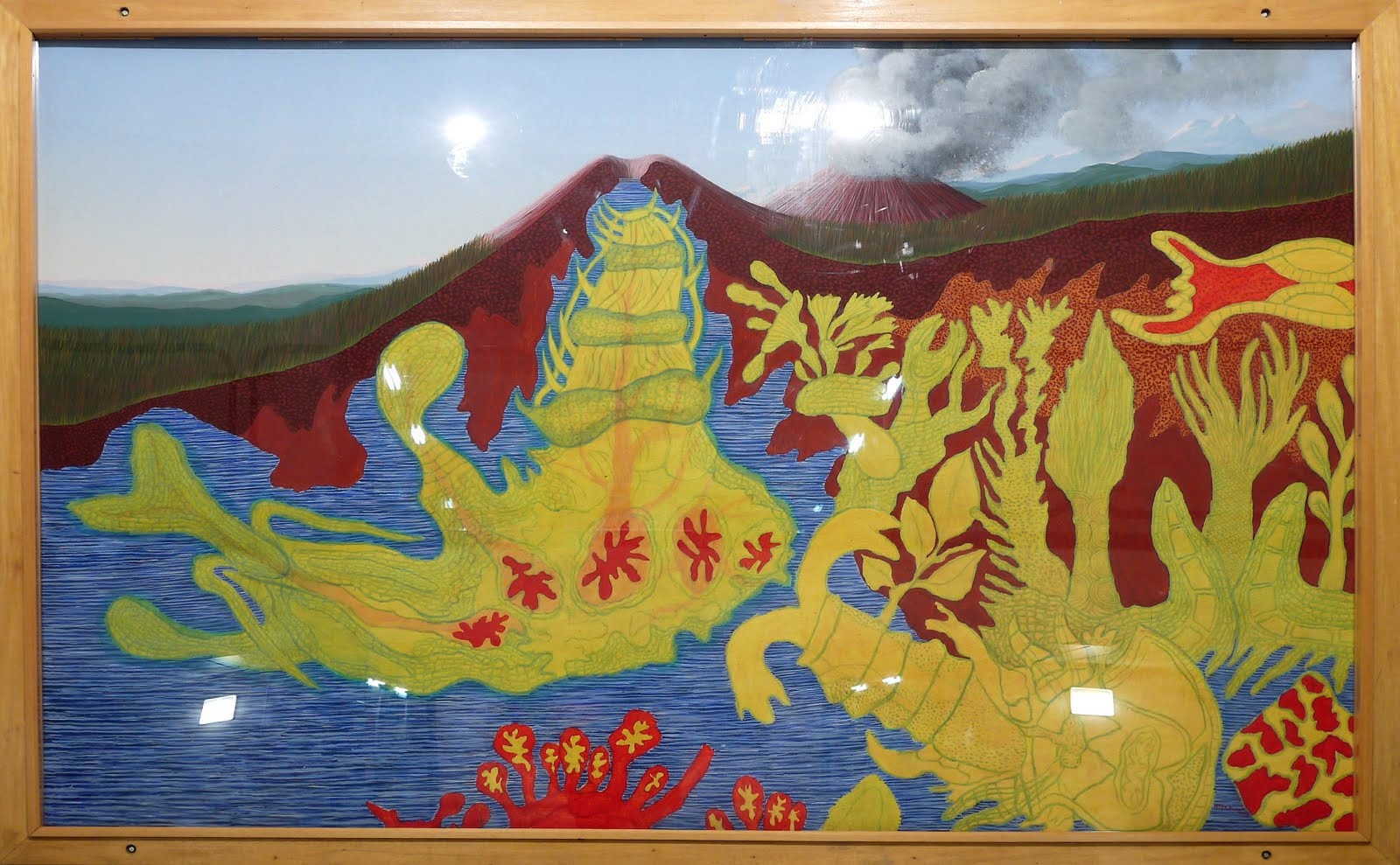 Alterlaa Kunst am Bau Peter Pongratz